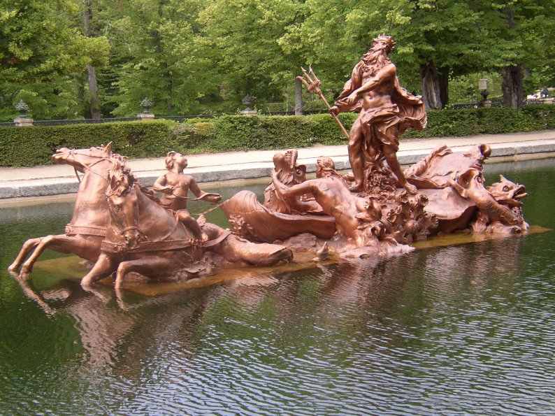 Segovia. (Castilla-León. España) Palacio Real de La Granja de San Ildefonso. Jardines. Fotografía realizada el 22 julio de 2003 por el autor.User:Pelayo2.